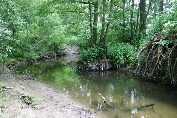 Vechte, oberlauf (Original text: Vechte, oberlauf - Datum 6-6-2004)